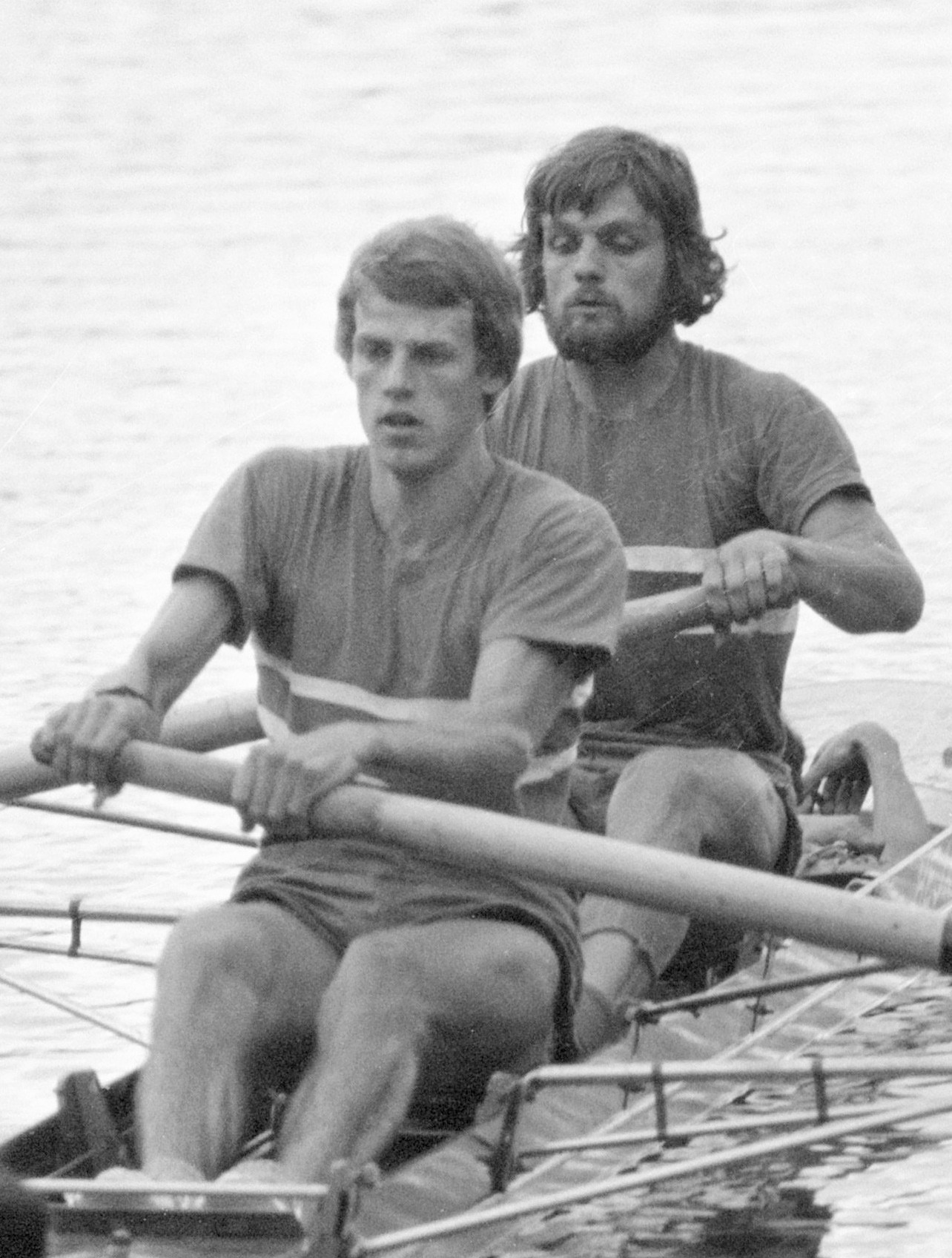 Nationale Roeikampioenschappen op Bosbaan, kampioen twee stuurman Kieft en Luttikhuizen en stuurman Zaanen